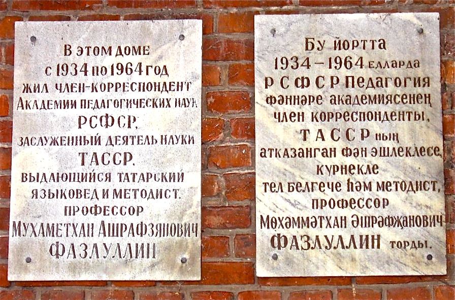 Мемориальная доска на доме, в котором жил известный казанский ученый-филолог профессор М. Фазлуллин